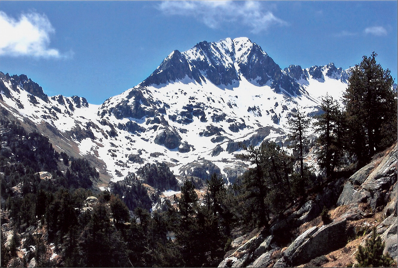 El tuc de Ratera vist a la primavera des de l'estany Llonc de Colomers This is a a photo of a natural area in Catalonia, Spain, with id: ES510081